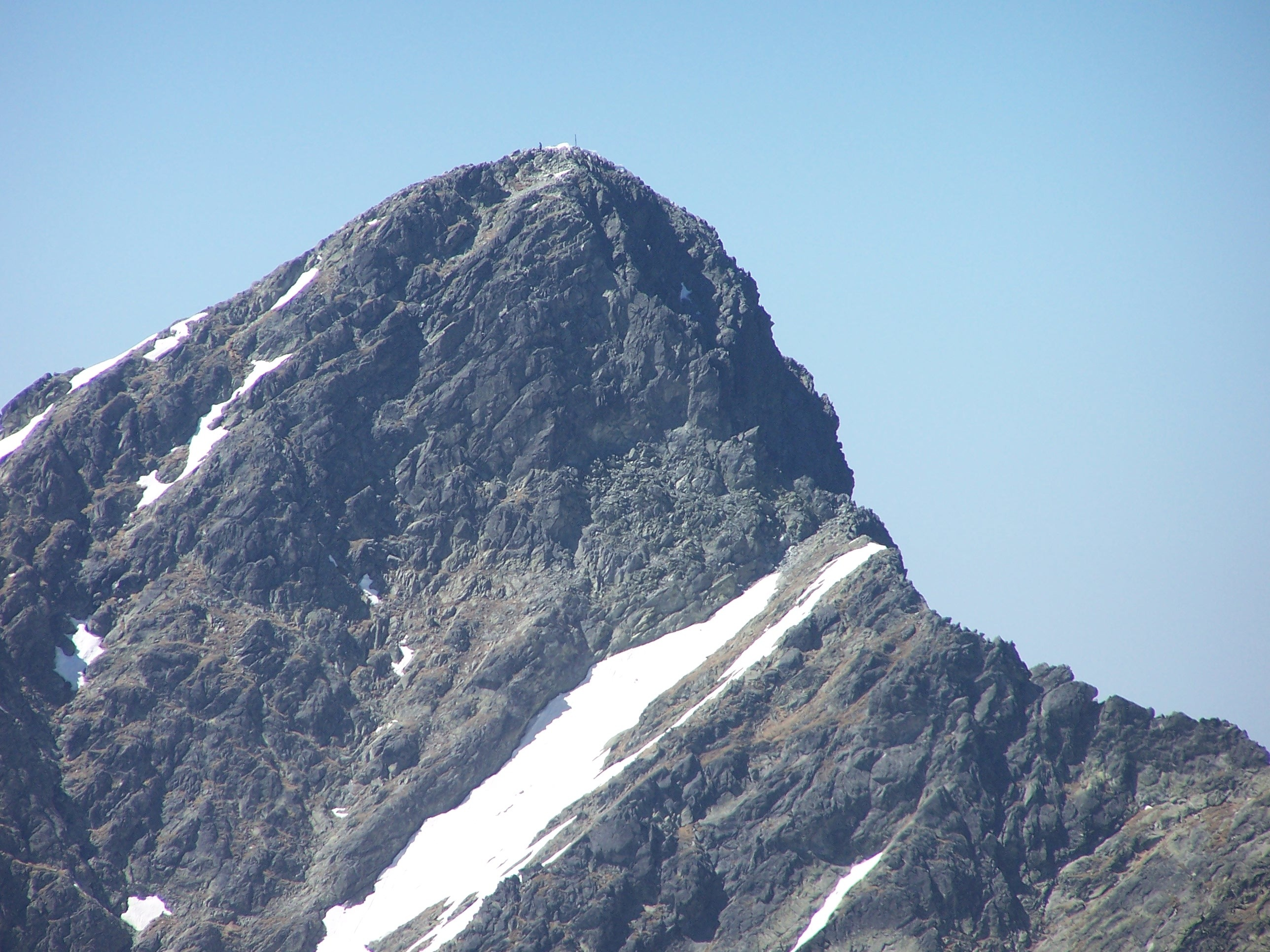 Kriváň